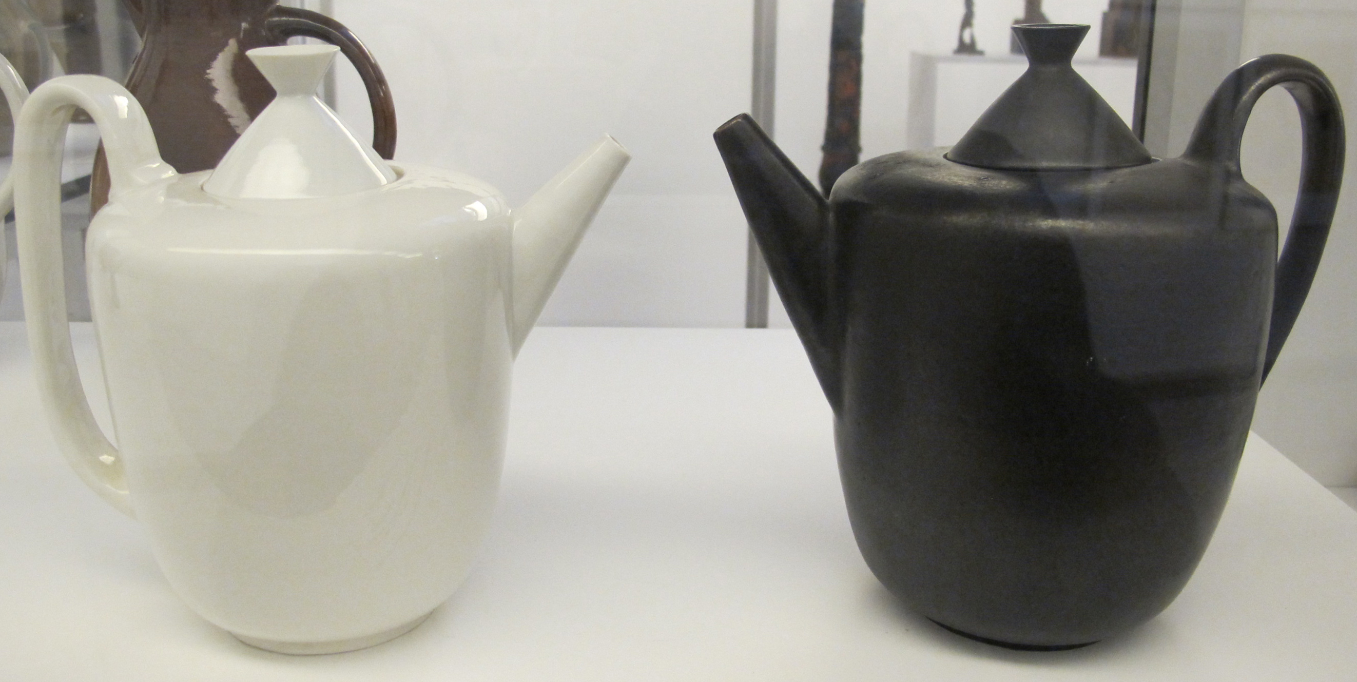 Otto lindig, caffettiere, 1923